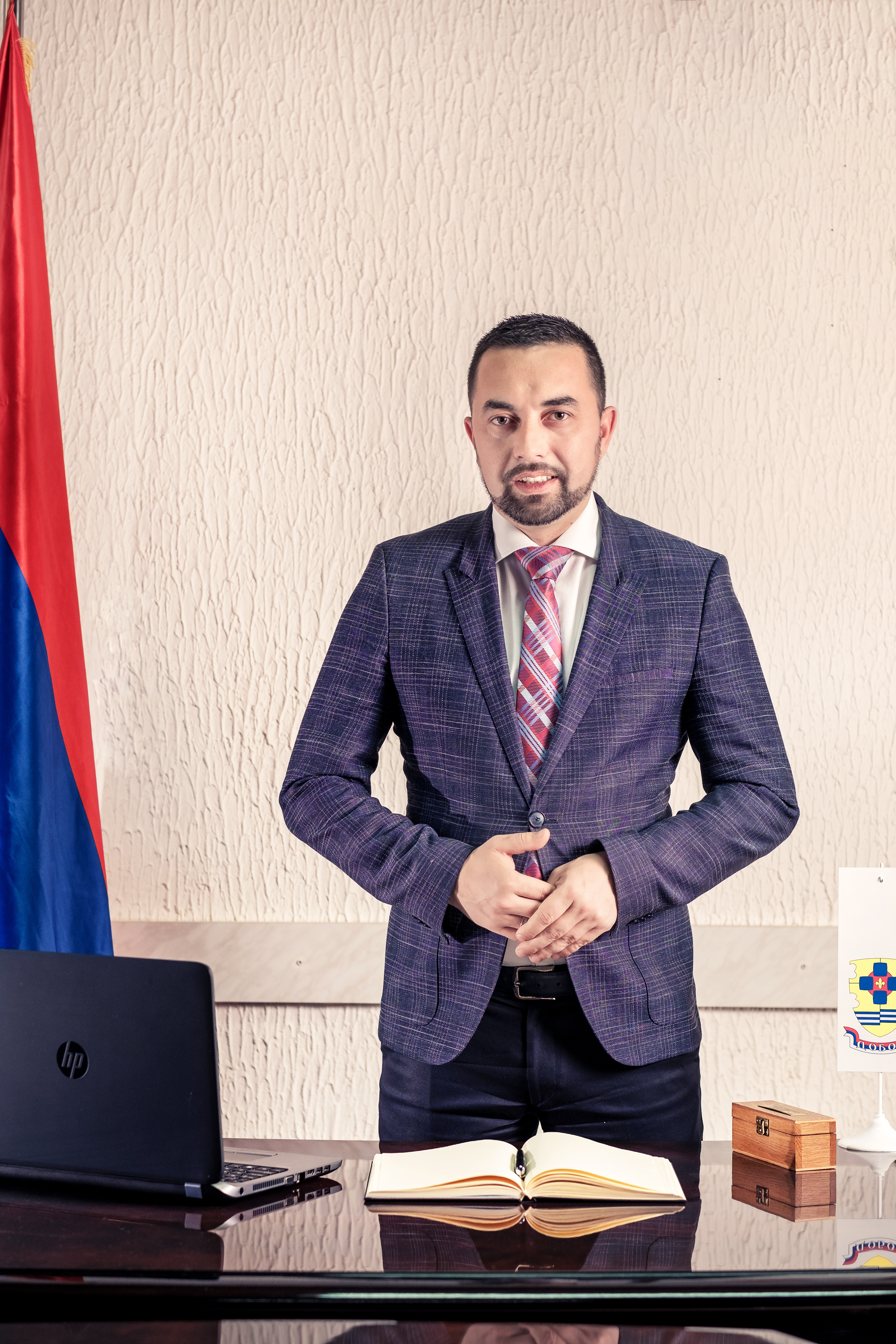 Gradonačelnik Doboja